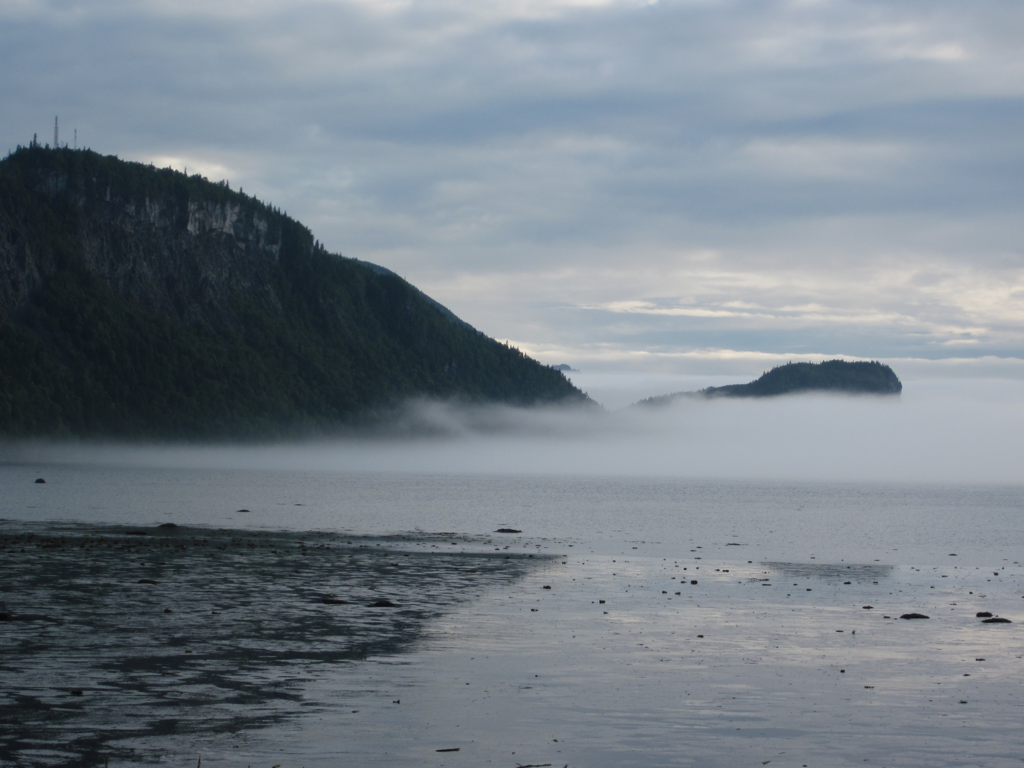 La bais du Ha! Ha! dans le parc national du Bic